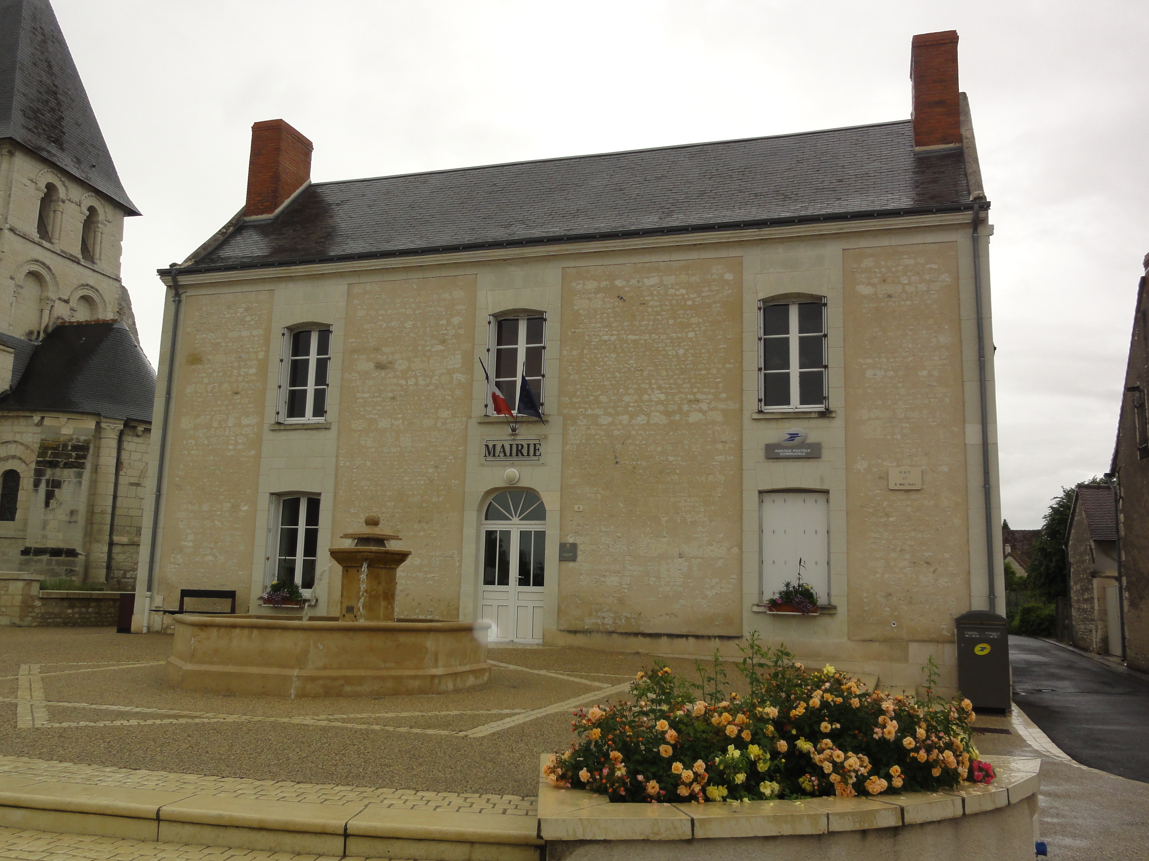 La Celle-Saint-Avant (Indre-et-Loire) Mairie